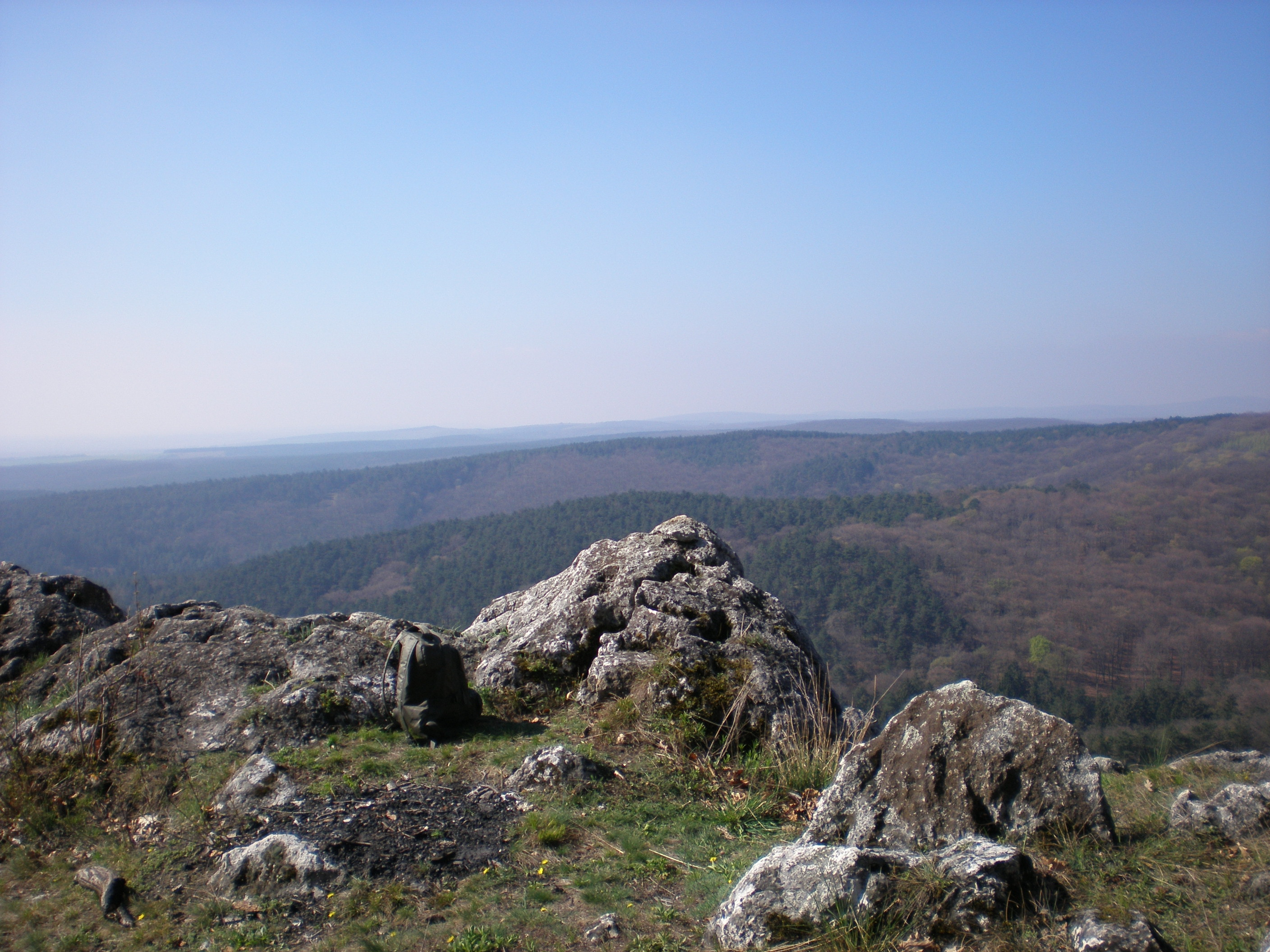 Orlie skaly, pohľad na západ